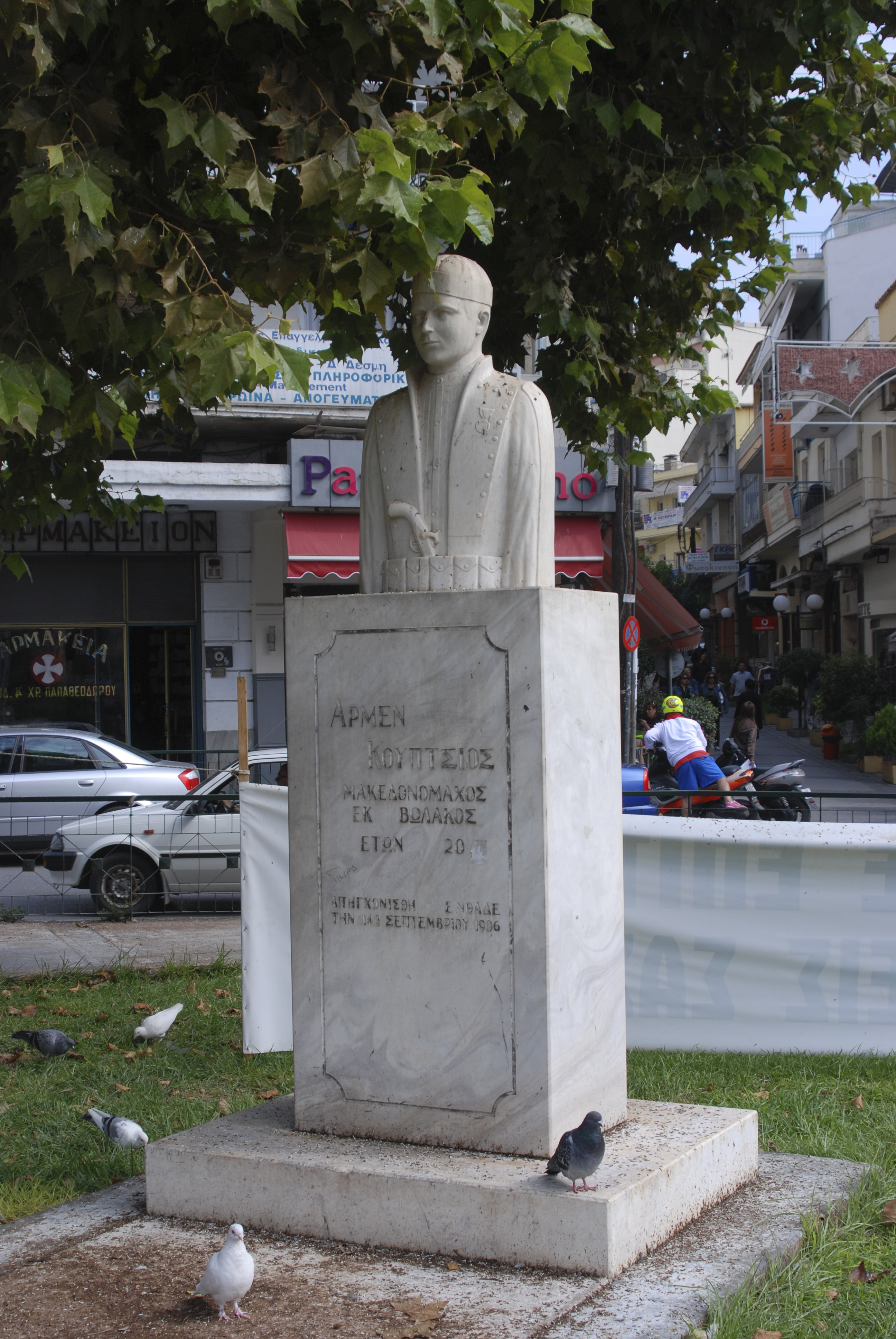 Паметник на Армен Купциос в град Драма.